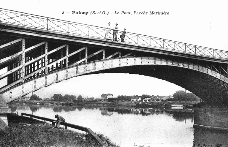 Arche marinière du pont de Poissy vers 1910, anciene carte postale.